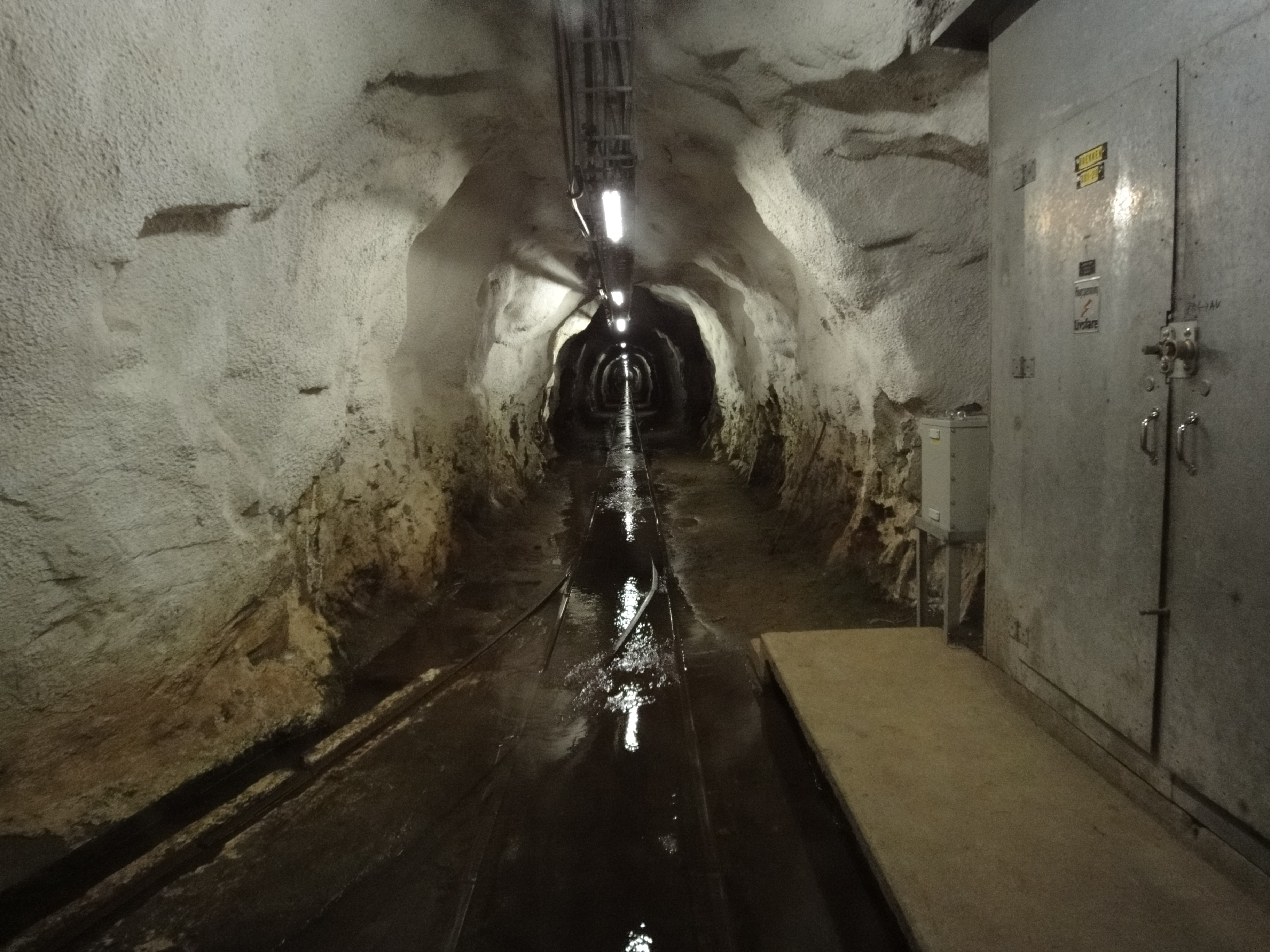 Tunelen mot nedre stasjon sett fra Brekket mellomstasjon.